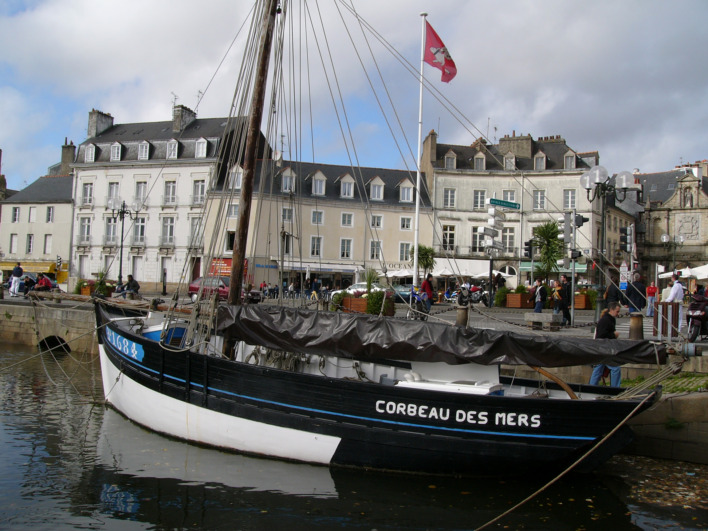 Vannes, le port dans la ville. A quai, le "Corbeau des mers" bateau ayant servi à des résistants pour rejoindre l' Angleterre au départ de l' île de Sein le 26 juin 1940. Auteur : Rv